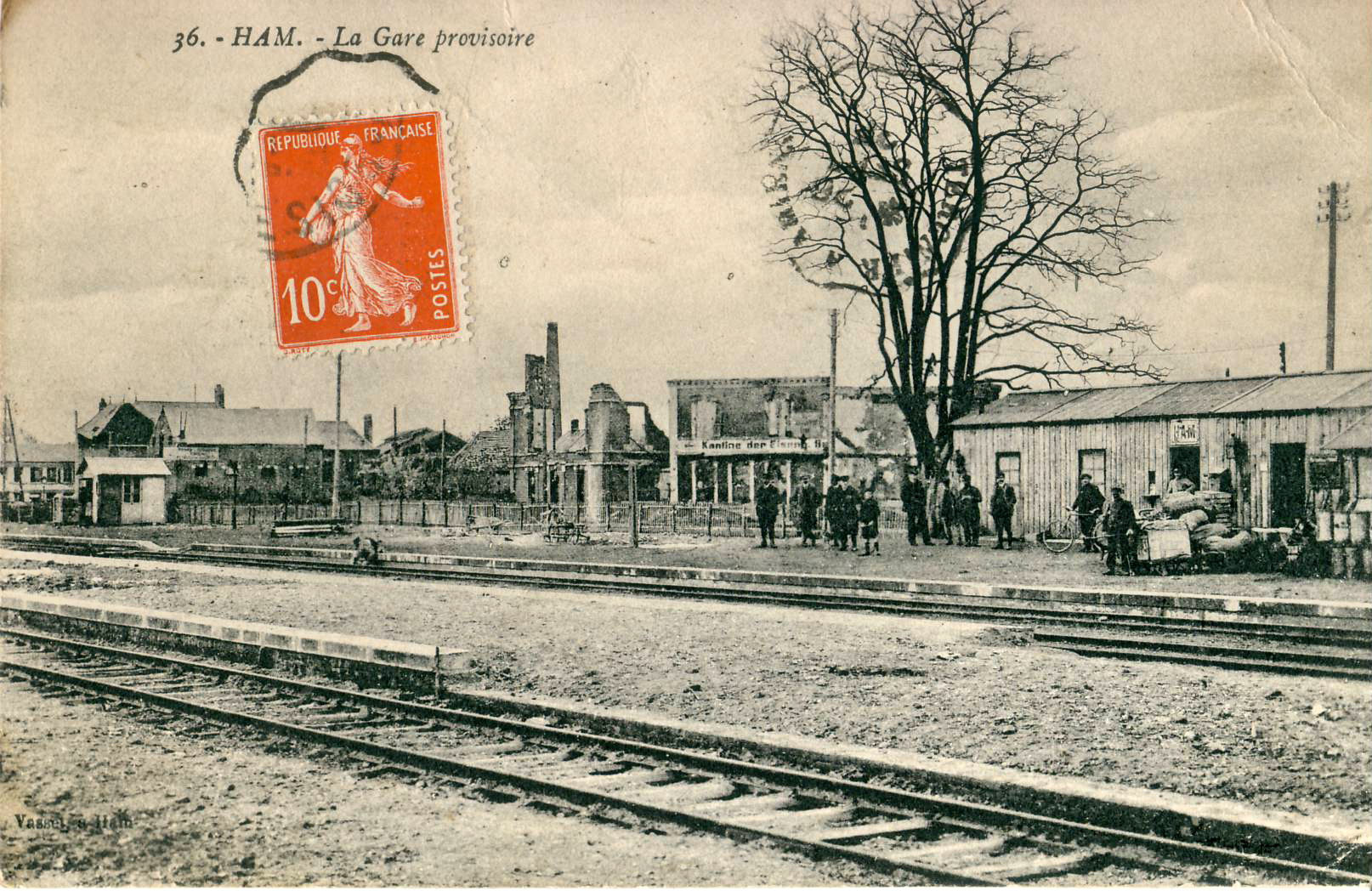 Carte postale ancienne éditée par VasselGare de Ham (Somme) : la gare provisoire (après les combats de la Première guerre mondiale)